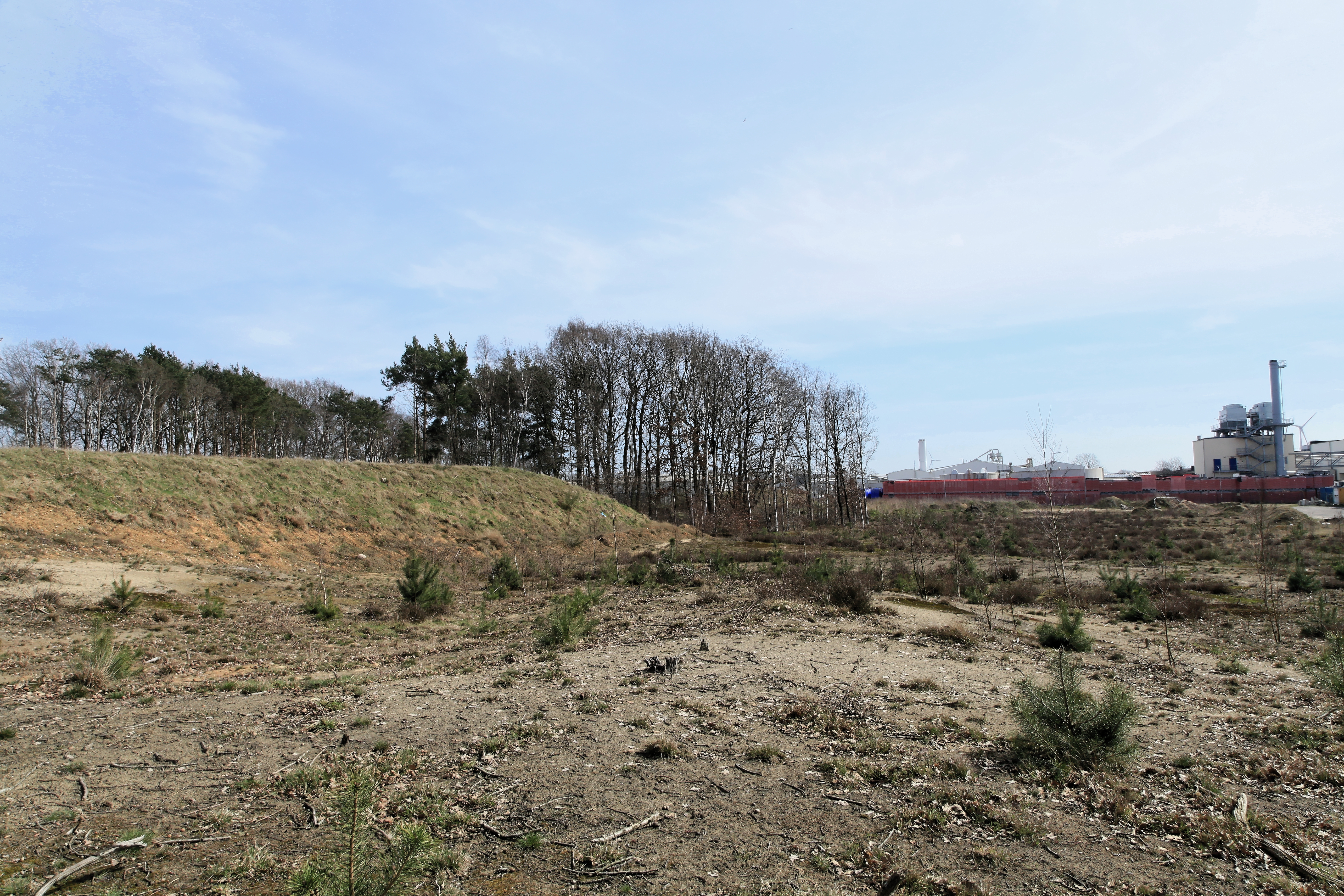 Großsteingrab Püttkesberge bei Nach Püttkesberge in Sögel. Das Grab befindet sich in einer sehr schäbigen, stark vermüllten Umgebung. Es ist sehr ungepflegt, zugewachsen und auch nicht ausgeschildert. Durch den nahen Schlachthof und die Fettschmelze stinkt es grausig nach Tod und Verwesung. Hier bleibt man nicht länger als unbedingt nötig. Ein Schandfleck Sögels!